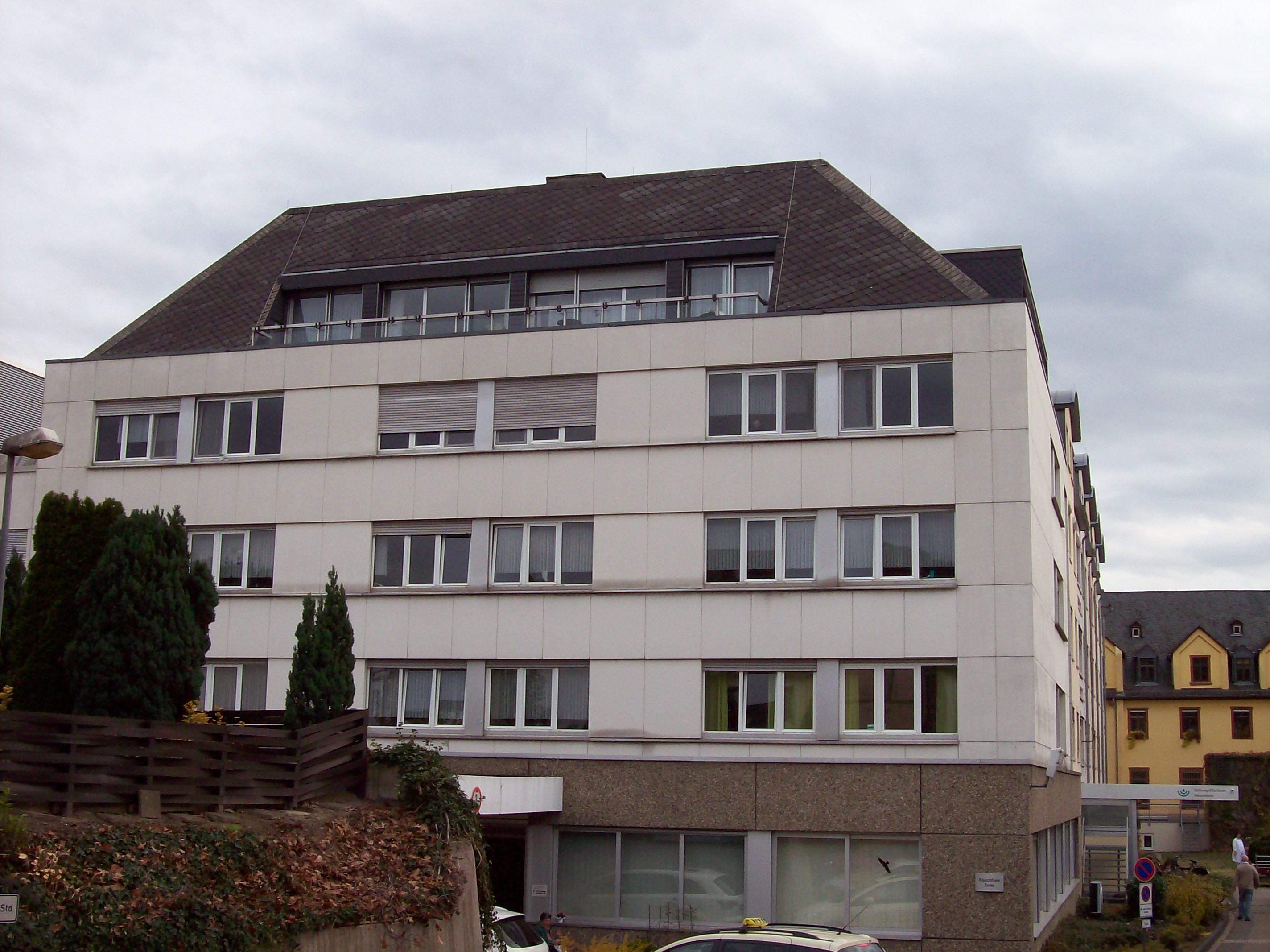 Das Gesundheitszentrum zum Heiligen Geist Boppard im Jahr 2010 vor dem Umbau